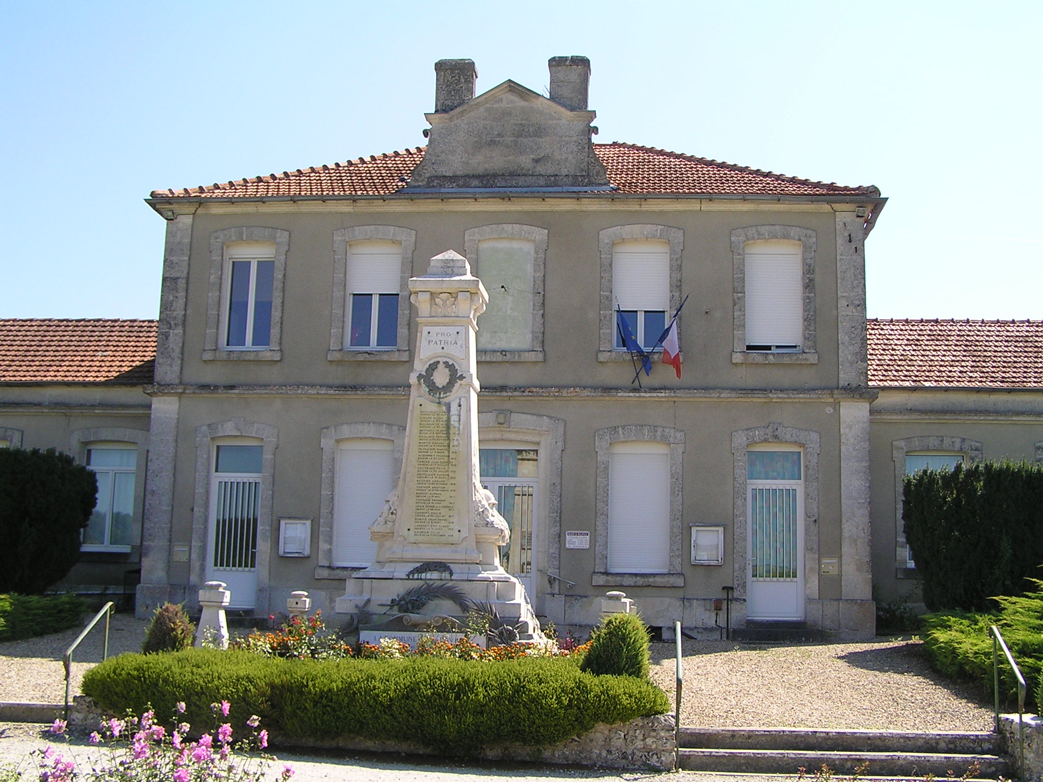 mairie de Malaville